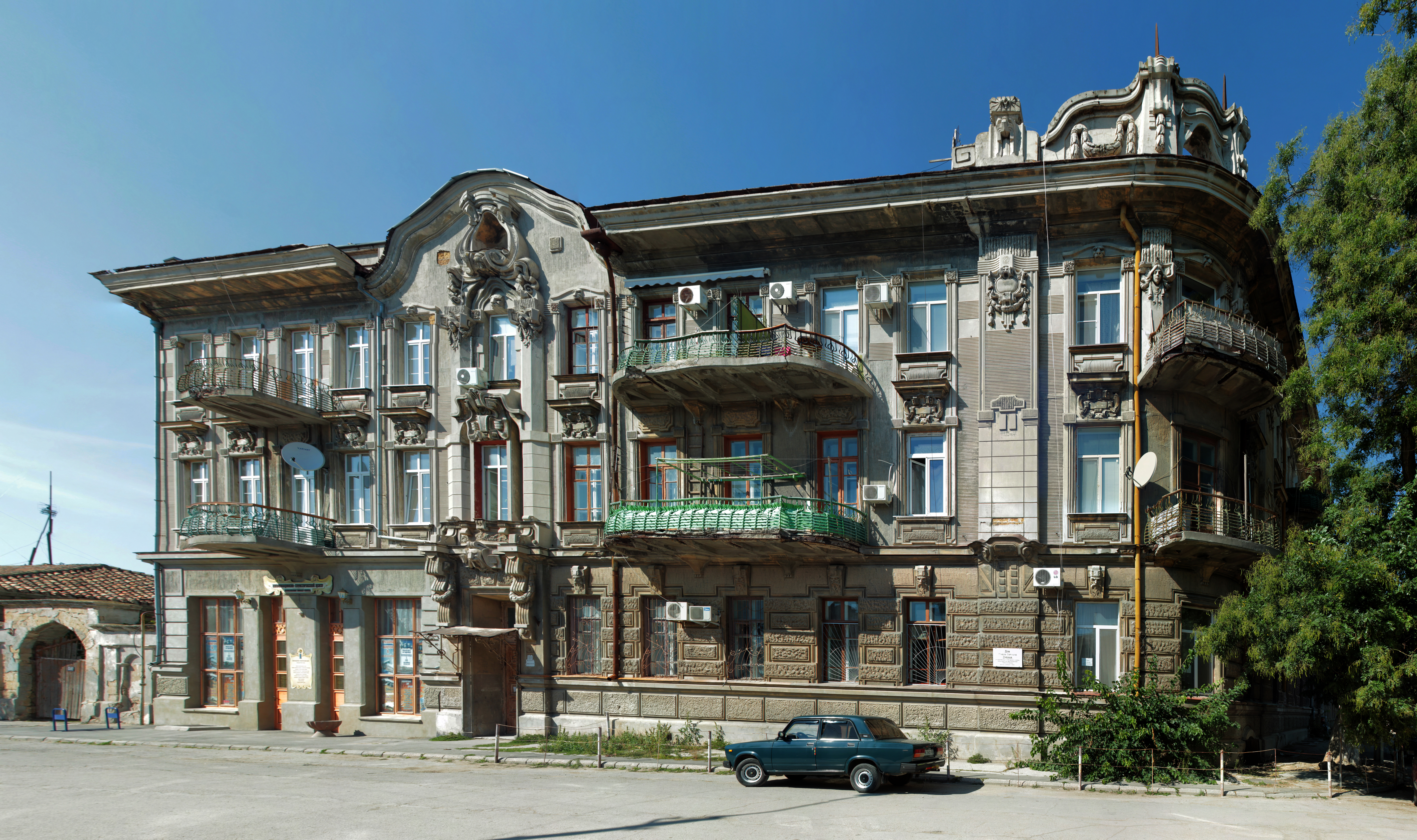 Будинок прибутковий С. Дувана з флігелем, Євпаторія, пров. Льотний, 2/ вул. Тучина, 1, літер «А», «В»